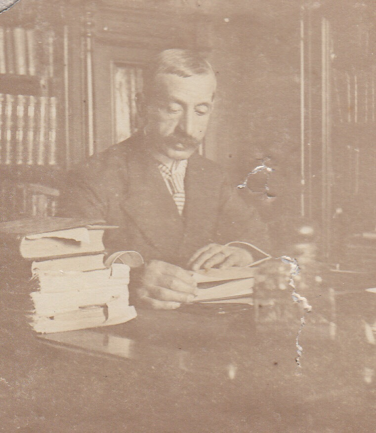 Esta fotografía muestra en ella a Pedro Nolasco Cruz Vergara en su despacho en la Notaria de su propiedad que se encontraba en el centro de Santiago de Chile. Falleció el 11 de noviembre de 1939 ejerciendo a esa fecha como notario. Esta fotografía esta captada en abril de 1918 y la original se encuentra en álbum familiar. Además ejerció otros cargos público con Subsecretario de guerra y marina (1903-1913), secretario del partido conservador (1901-1928). Se destacó en las letras como el creador en Chile de la Crítica Literaria. Se le llamo el Saint Beuve chileno.